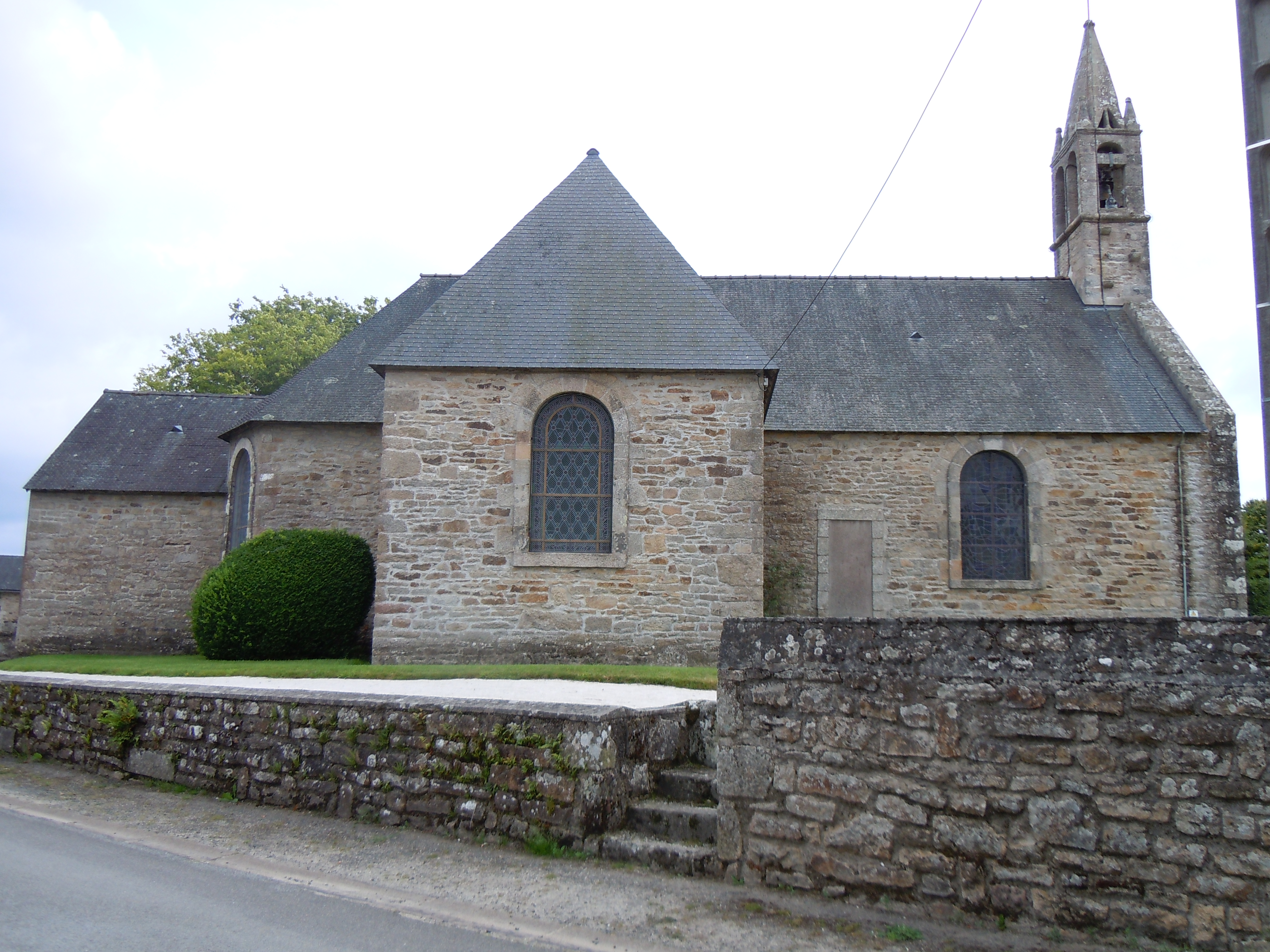 l'église Saint-Pierre-aux-Liens de Baye, du XIXe siècle, département du Finistère .